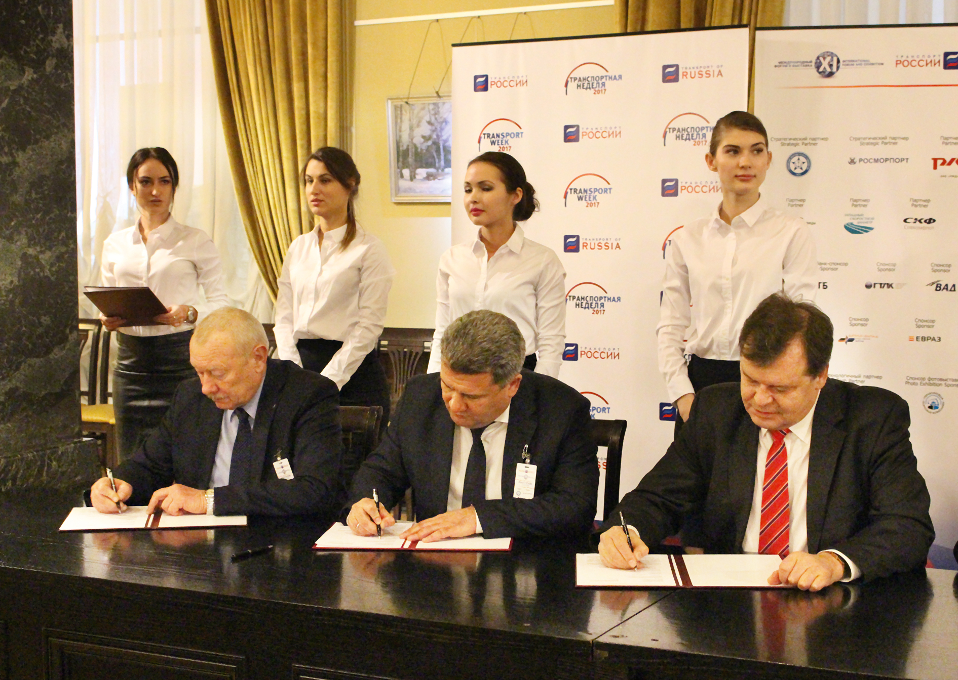 Подписание межотраслевого соглашения